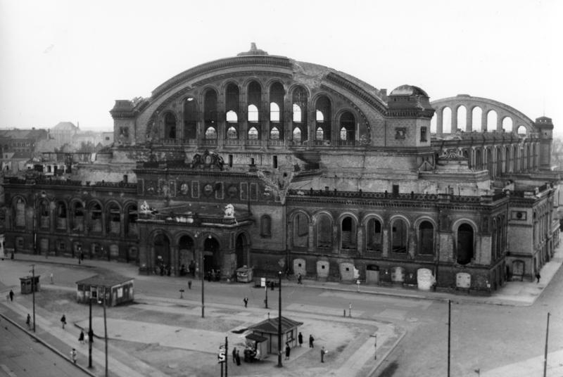 1951 Berlin Ruine des Anhalter Bahnhofes